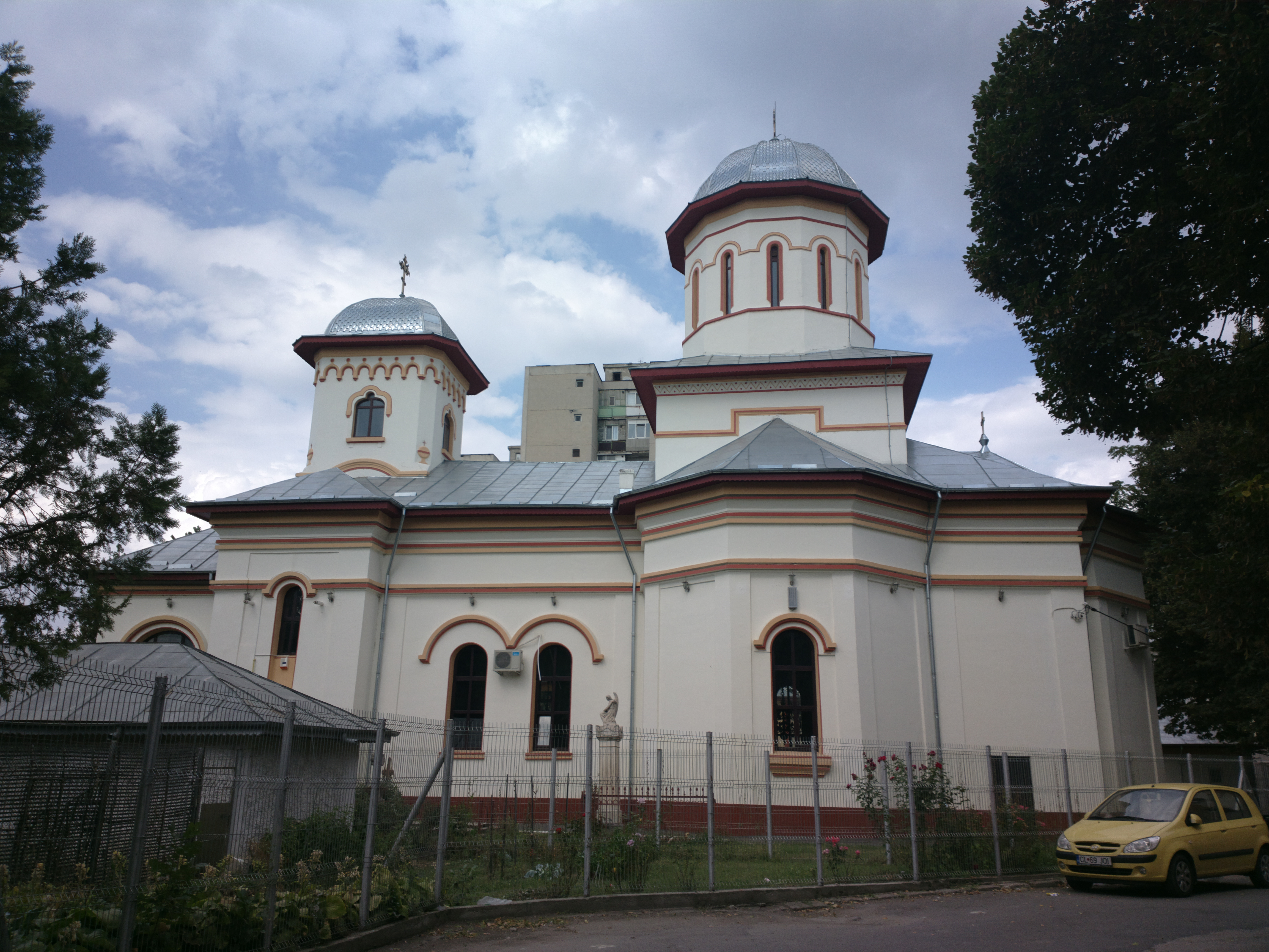 Biserica „Sf. Nicolae” 01